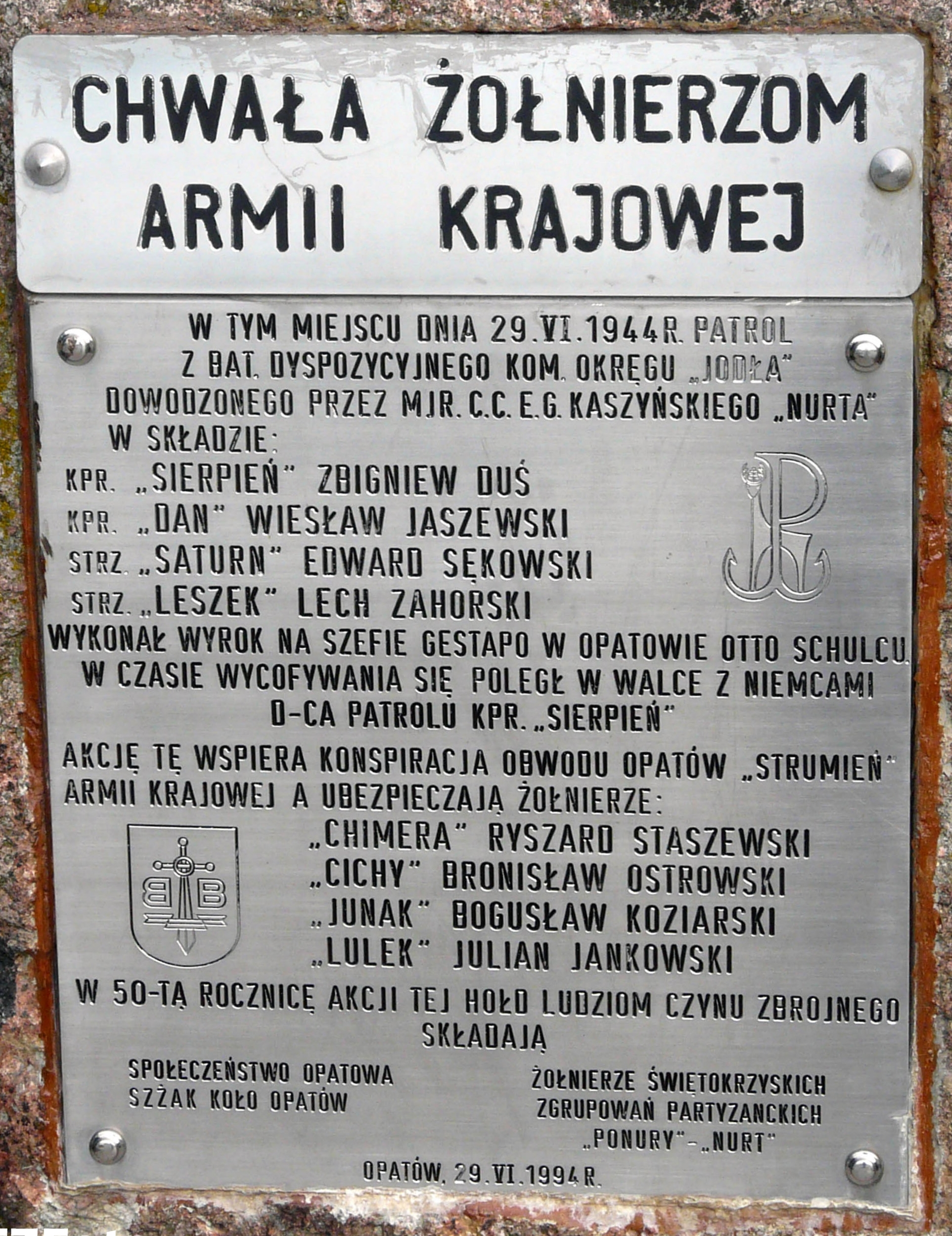 Tablica upamiętniająca dokonania Armii Krajowej w Opatowie.